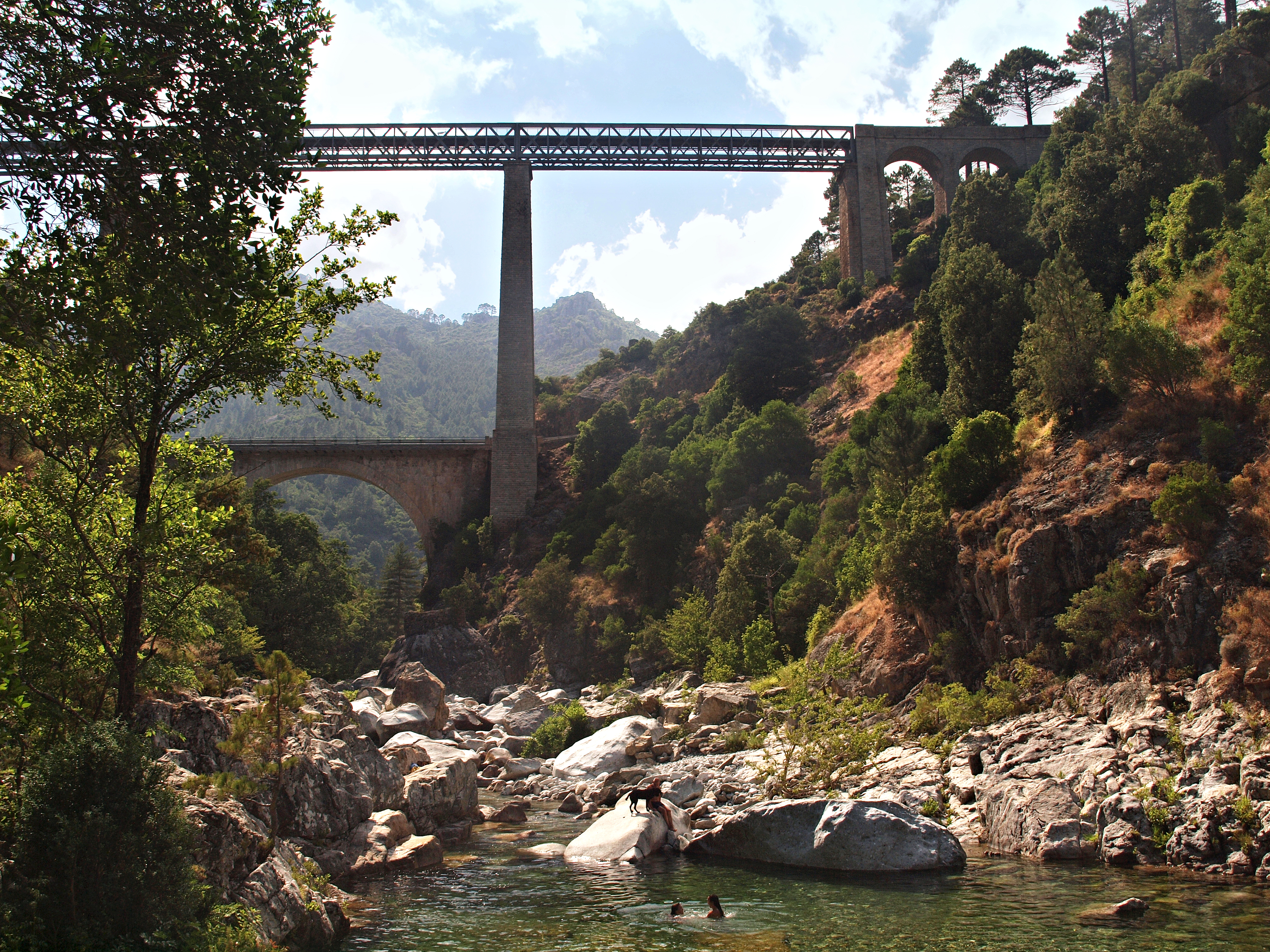 Venaco - Vivario, Centre Corse (Corse) - Le viaduc Eiffel et l'ancien pont de la RN 193, vus depuis le lit du Vecchio